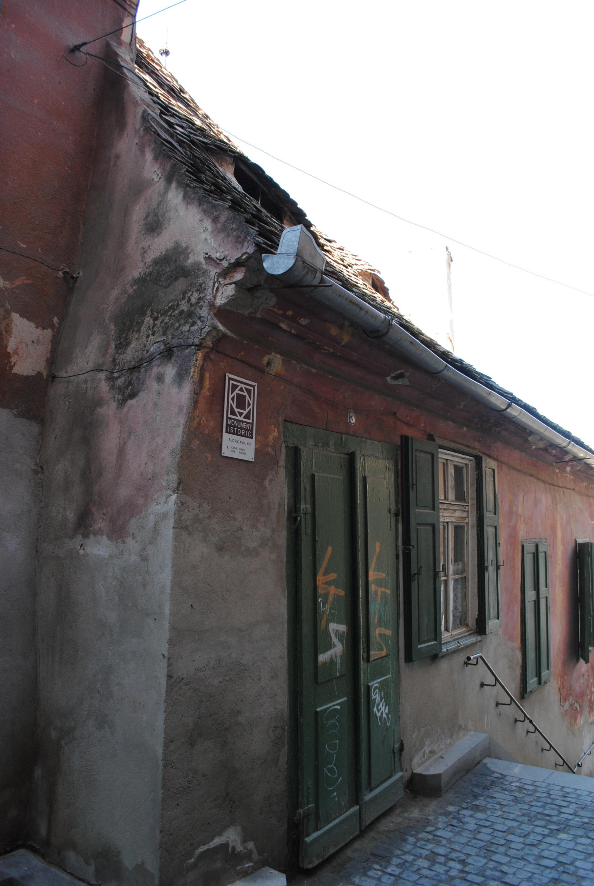 Casă, sec. XV,1567, 1875 - 1900